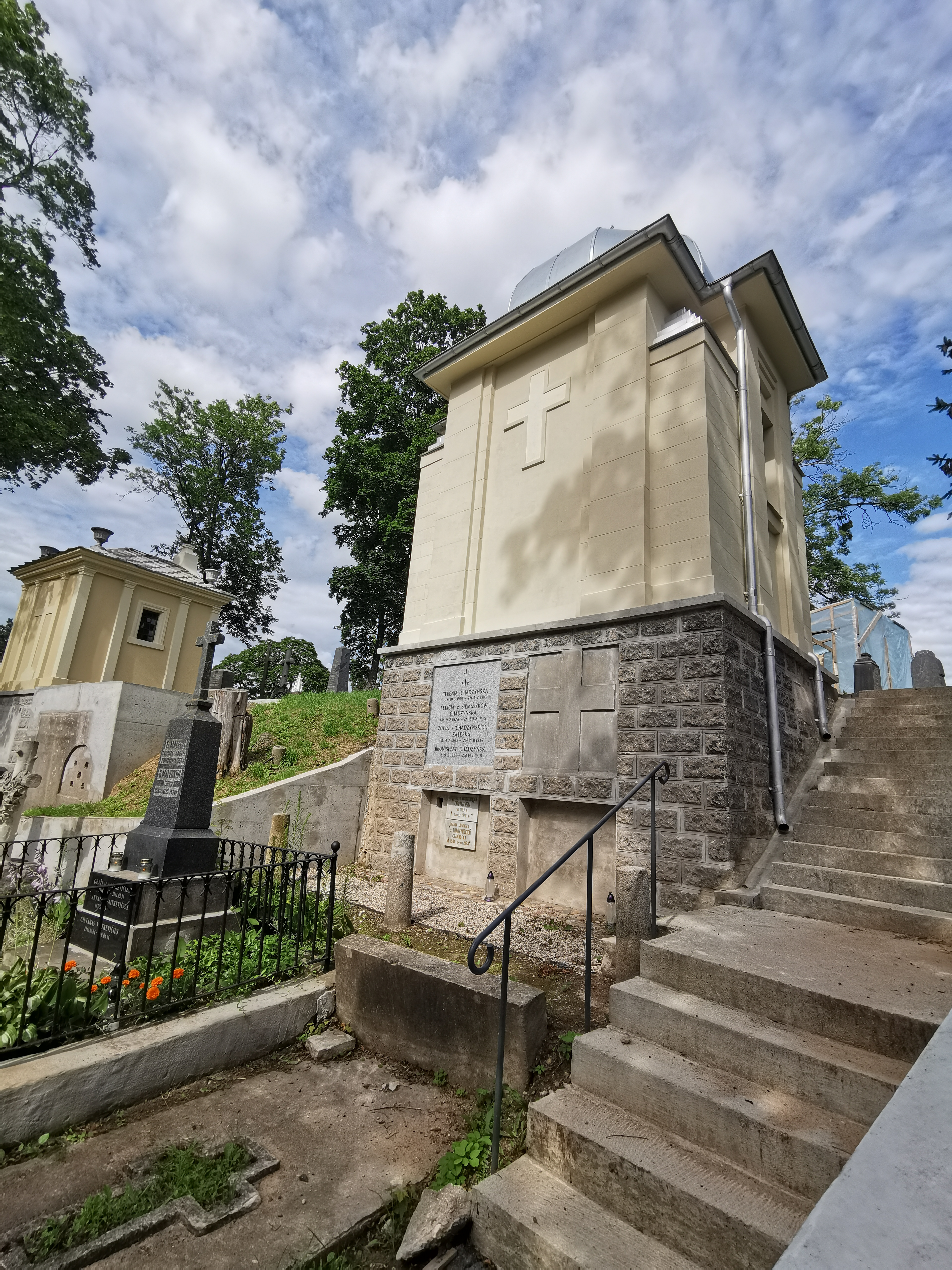 Chondzinskių šeimos koplyčia